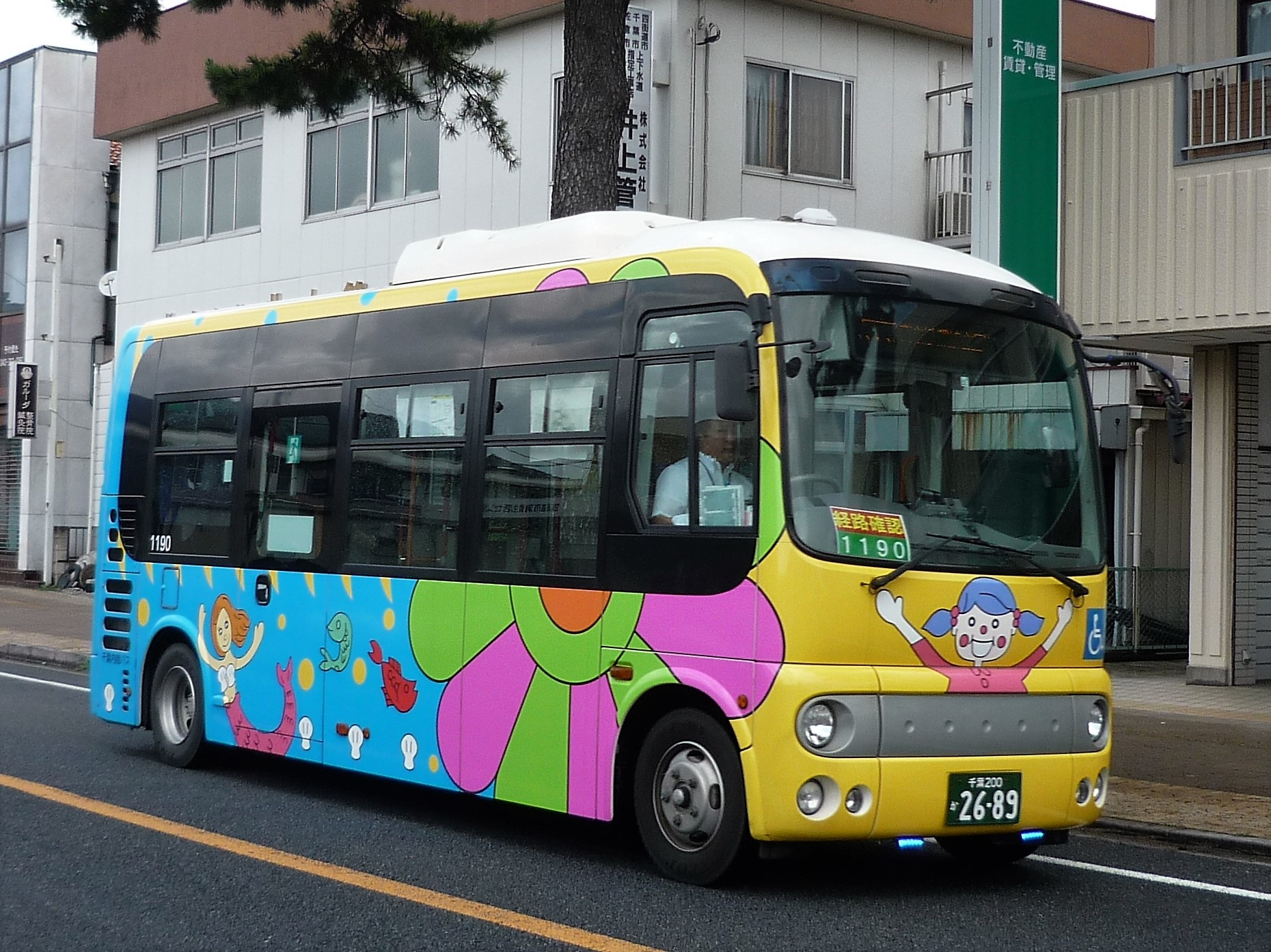 四街道駅北口付近を走行する市内循環バスヨッピィ1190号車 Panasonic Lumix DMC-FS3